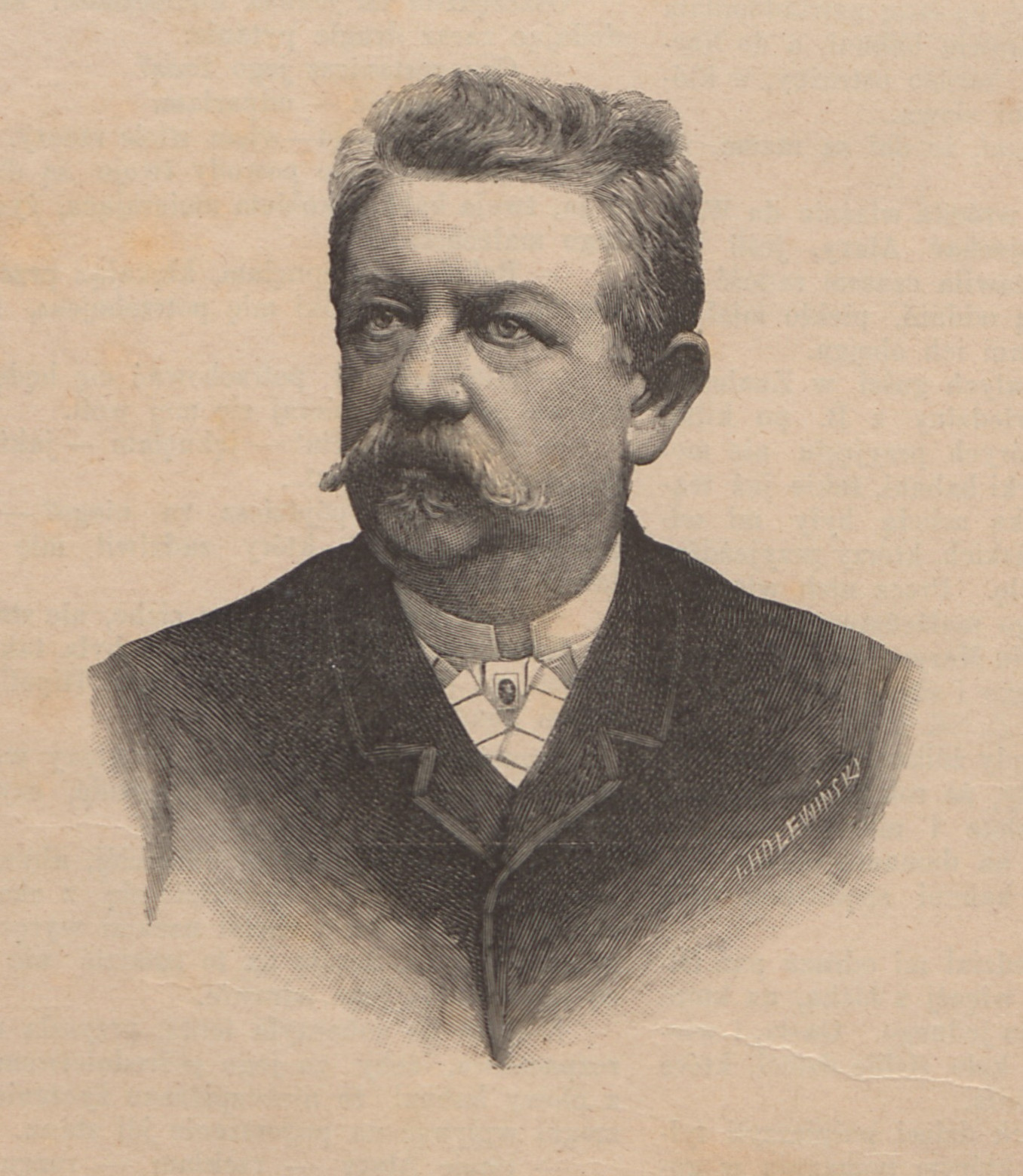 Ludwik Norblin